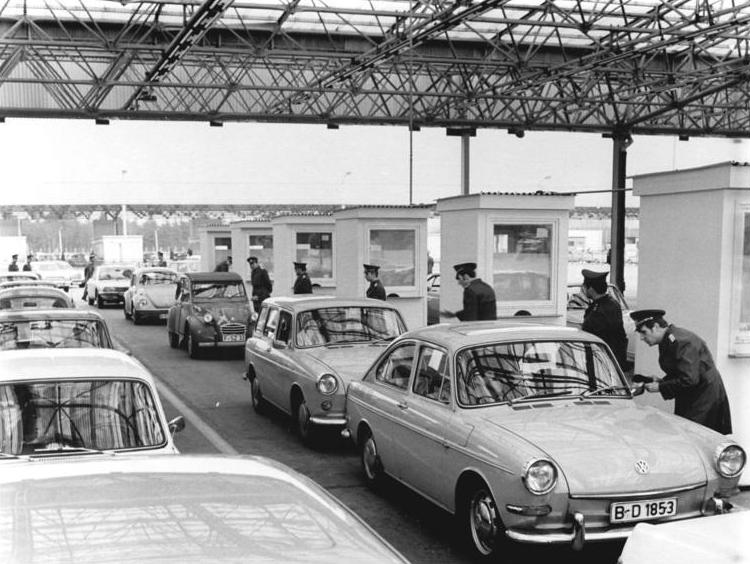 ADN-ZB Reiche-2.4.1972-ill Berlin-Potsdam: Zeitweilige Regelung in Kraft- Die Geste des guten Willens der DDR führte auch am 30. und 31.März.1972 zu einem regen Besucherverkehr an den Grenzübergangsstellen zur DDR und ihrer Hauptstadt.UBz: zügig und korrekt erfolgt an der Grenzübergangsstelle Drewitz bei Potsdam die Abfertigung der Tansitreisenden und der in die Südbezirke der DDR reisenden Westberliner Bürger.(siehe ADN-Meldungen)